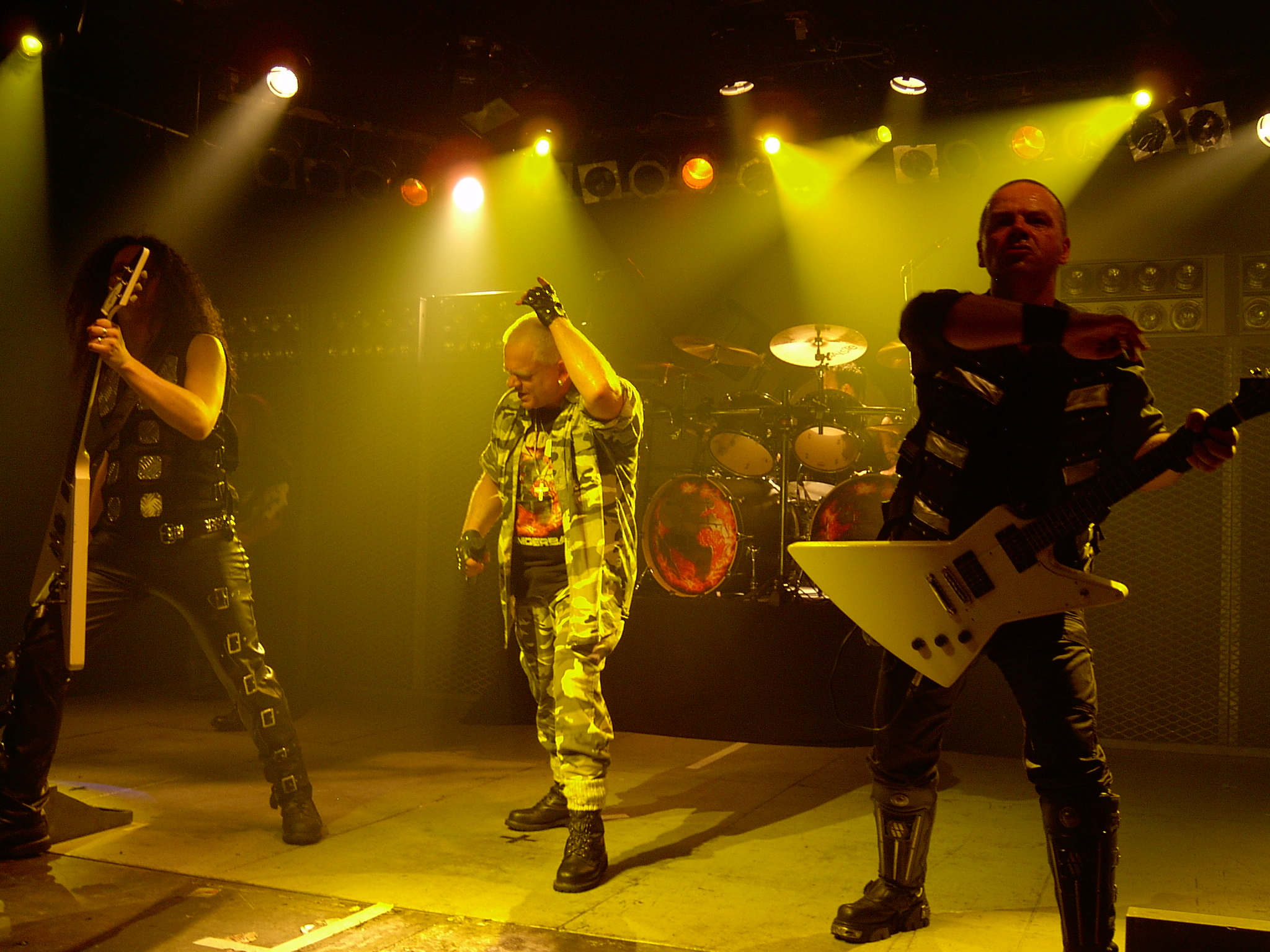 UDO live in Nürnberg Hirsch